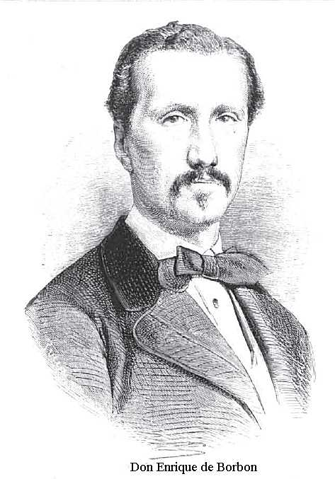 Enrique de Borbon y Borbon dos Sicilias, duca di Siviglia, morto in duello il 12 marzo 1870 per mano di suo cugino Antonio di Orleans, duca di Montpensier.